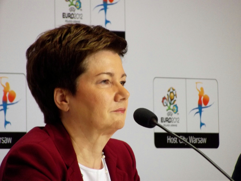 Zdjęcie zrobione w pierwszym dniu UEFA Euro 2012 w Warszawie, dniu otwarcia turnieju i meczu Polska-Grecja.